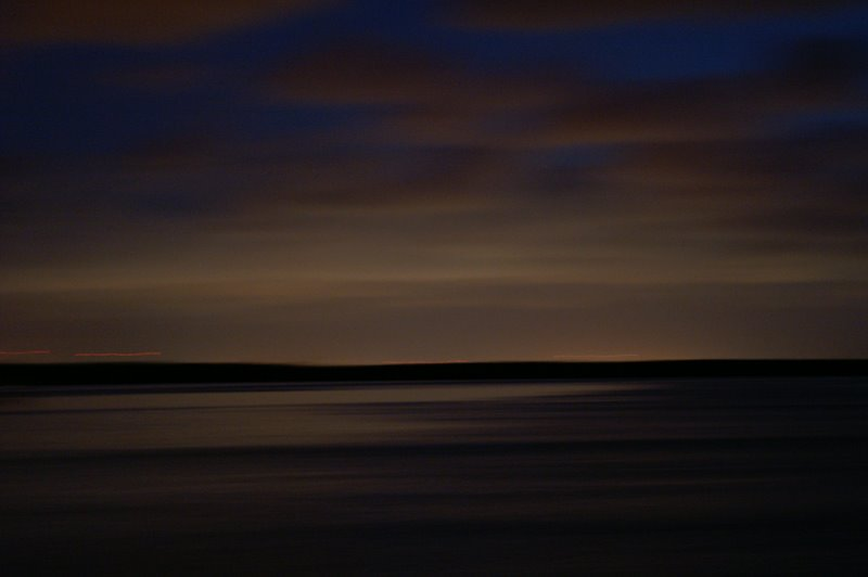 Estuário do Rio Paraíba. Vista para pór do Sol.